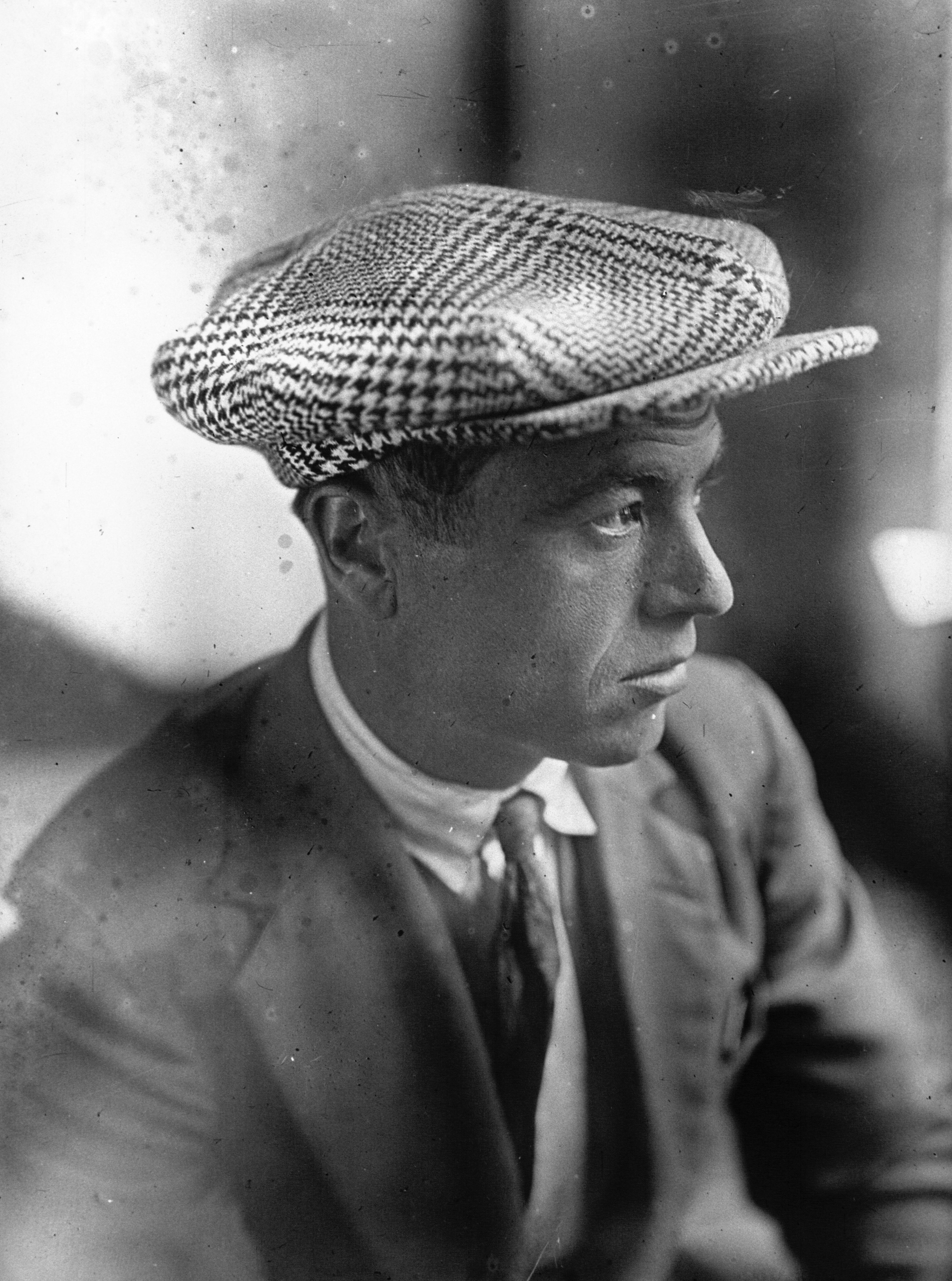 Salvador Cardona lors du Tour de France.